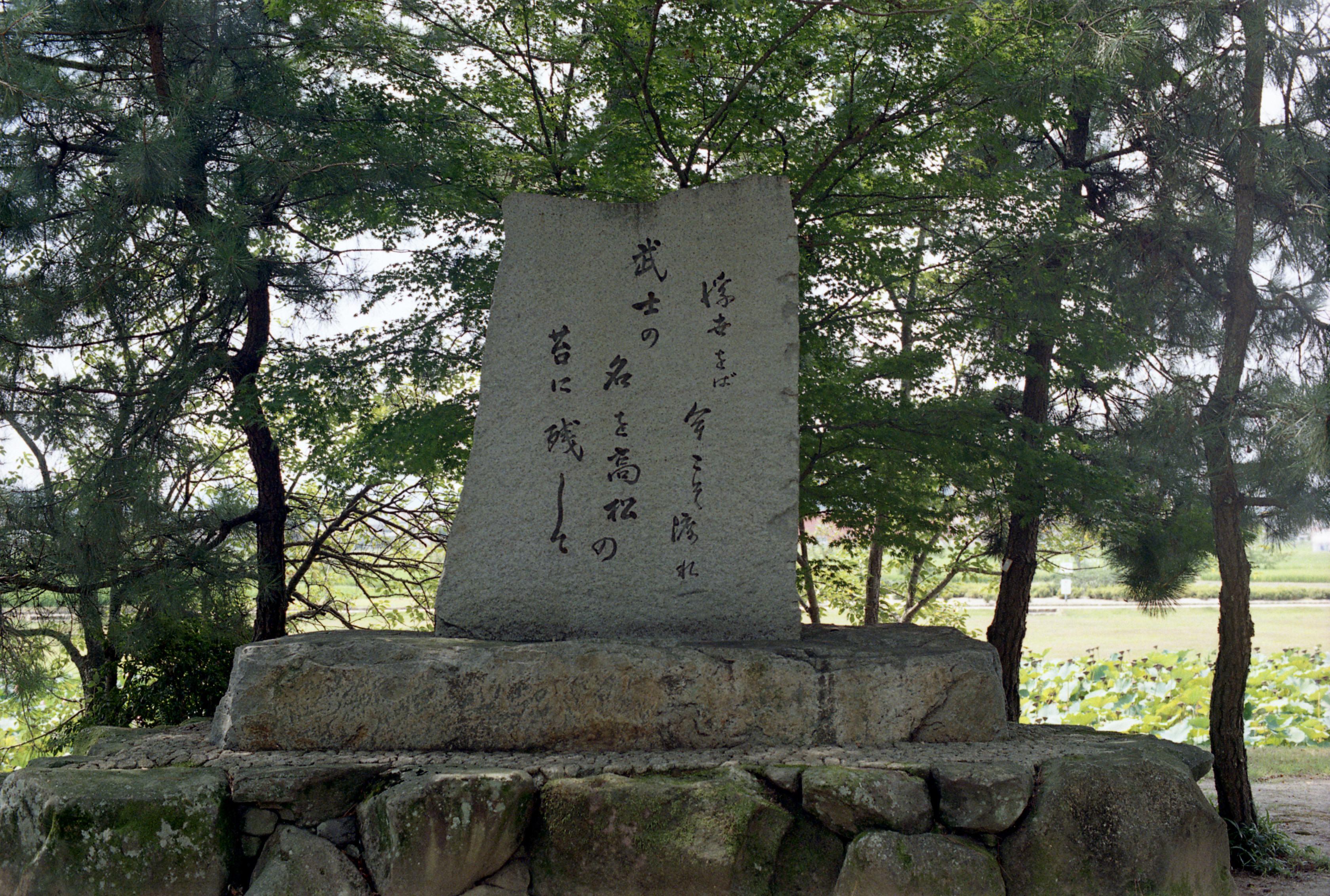 備中高松城